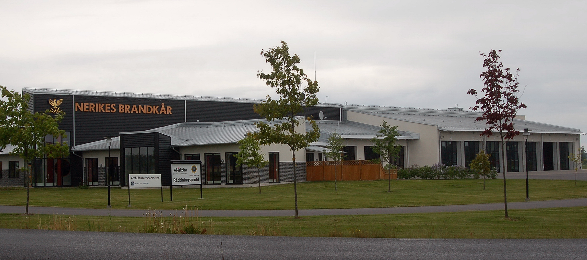 Nerikes Brandkårs anläggning vid Bysta, Kumla